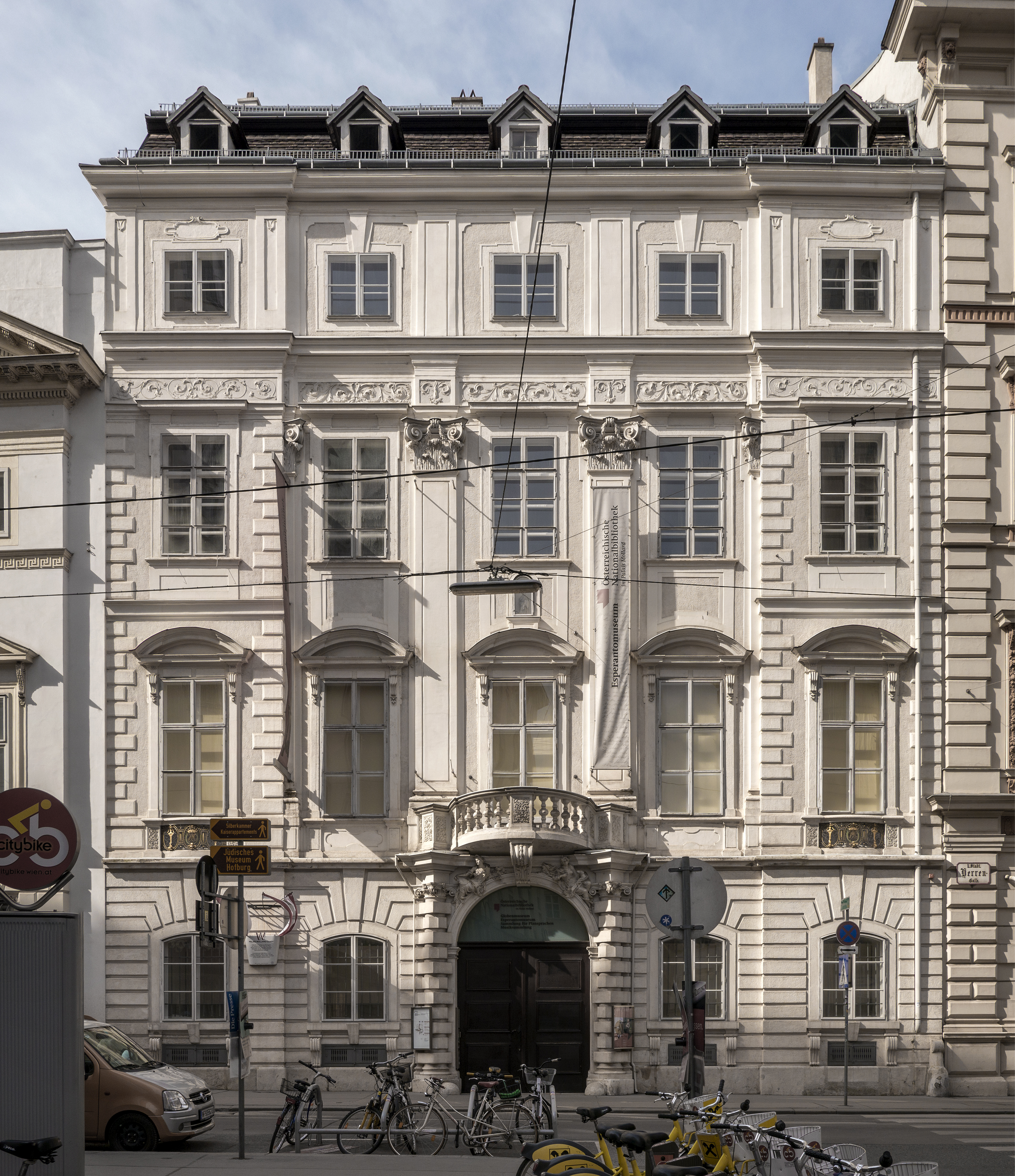 Stadtpalais, Ehem. Palais Mollard-Clary